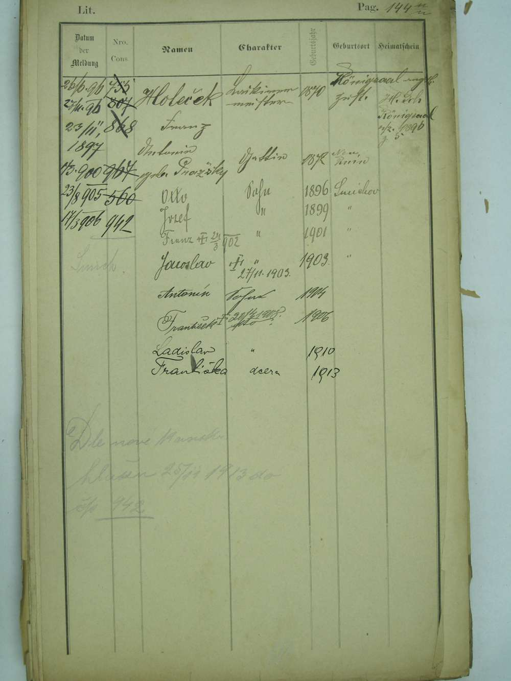 Policejní přihláška rodiny Holečkových ze Smíchova. Národní archiv ČR.